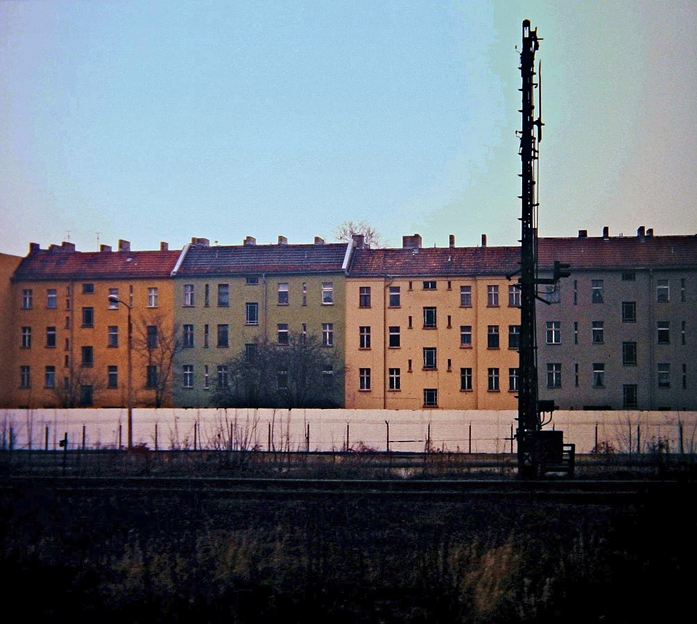 Mauerabschnitt Nähe S-Bahnstation Wollankstraße, Berlin 1988